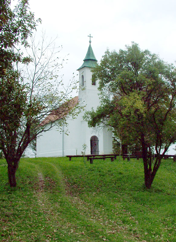 A börzöncei Szent Lőrinc kápolna